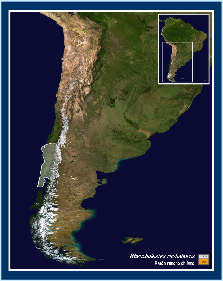 Mapa del área de distribución de Rhyncholestes raphanurus